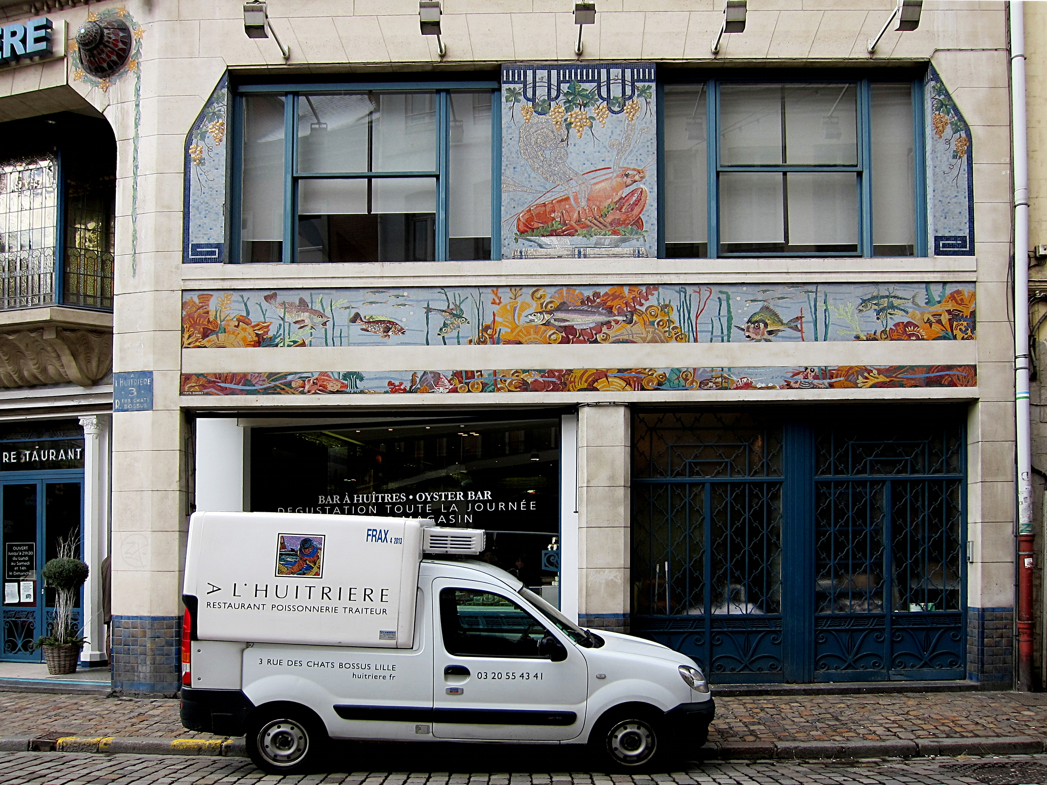 Les mosaïques art déco de la façade du restaurant l'Huitrière à Lille.